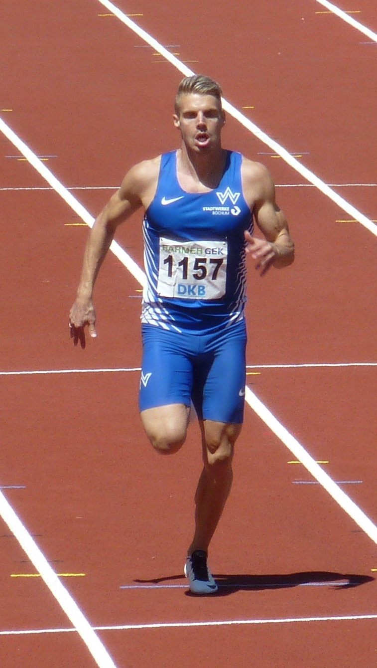 Julian Reus, 200-Meter-Lauf, Deutsche Leichtathletik-Meisterschaften 2015